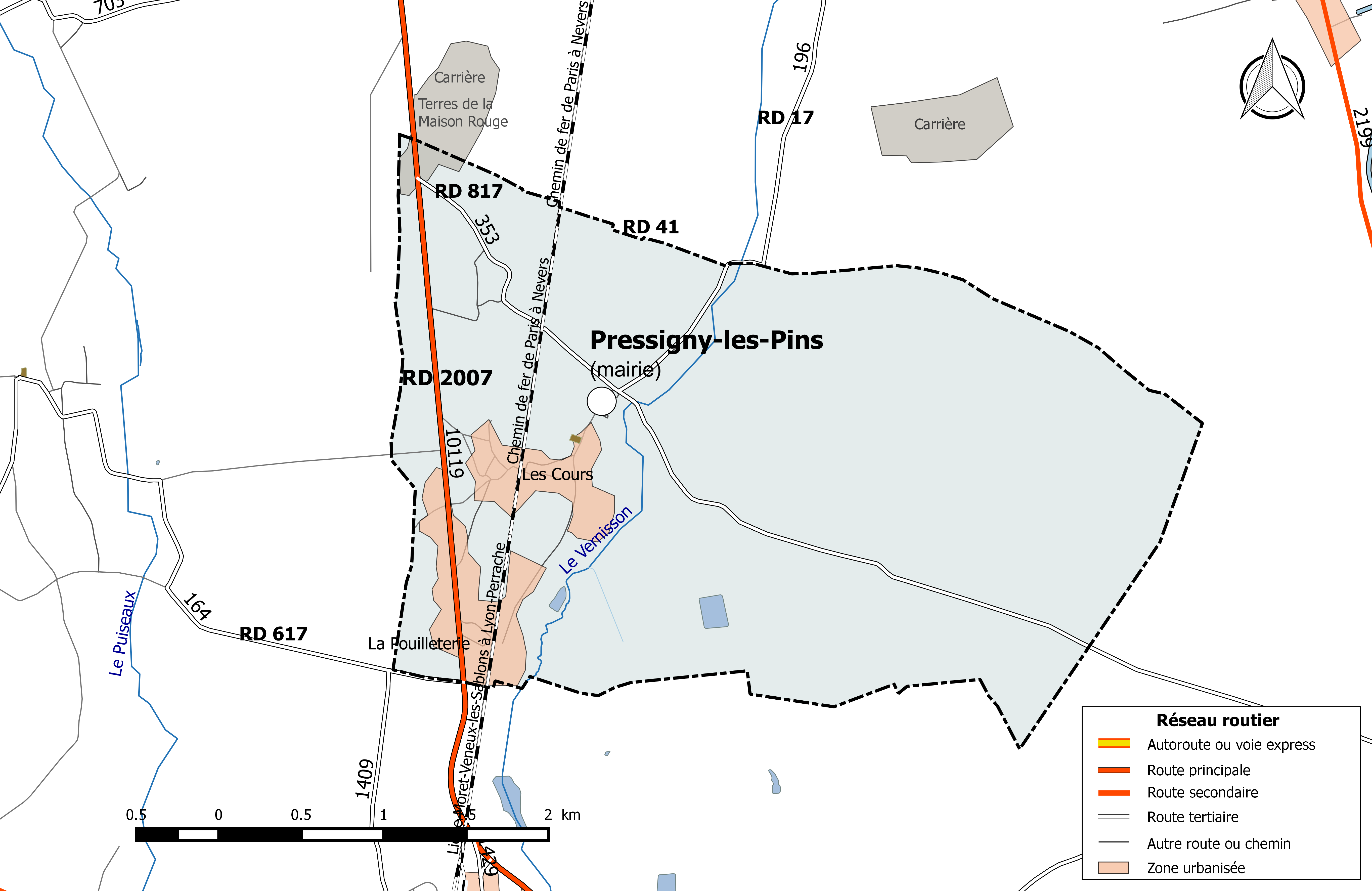 Carte du réseau routier de la commune de Pressigny-les-Pins.